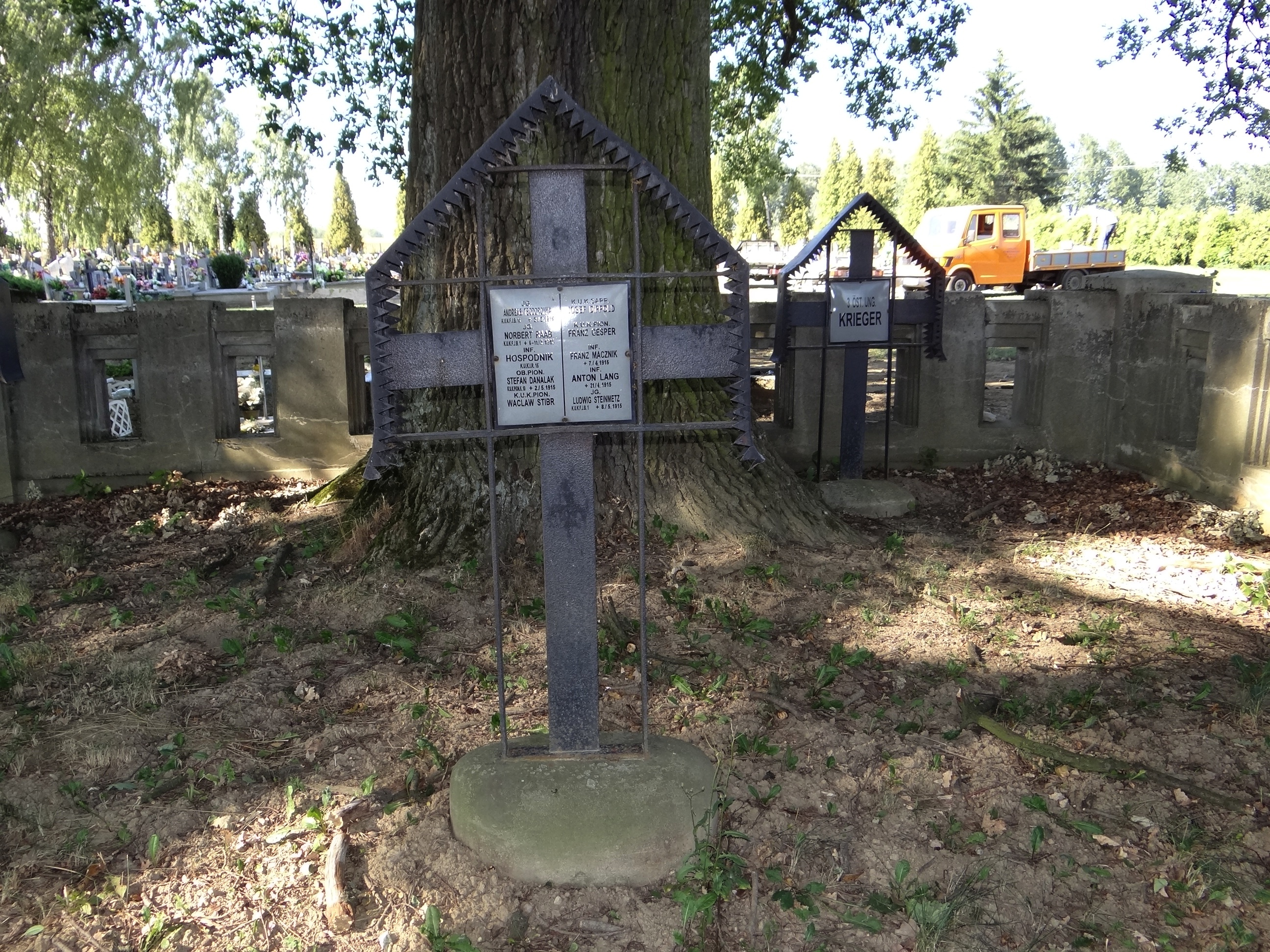 Cmentarz wojenny nr 255 - Wietrzychowice